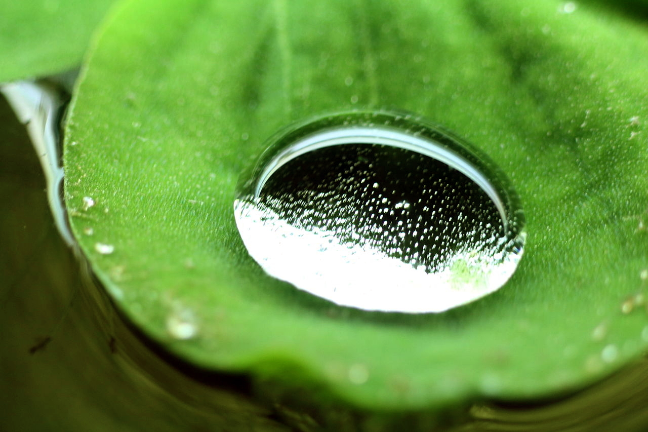 Wassertropfen auf Muschelblume, Pistia stratiotes